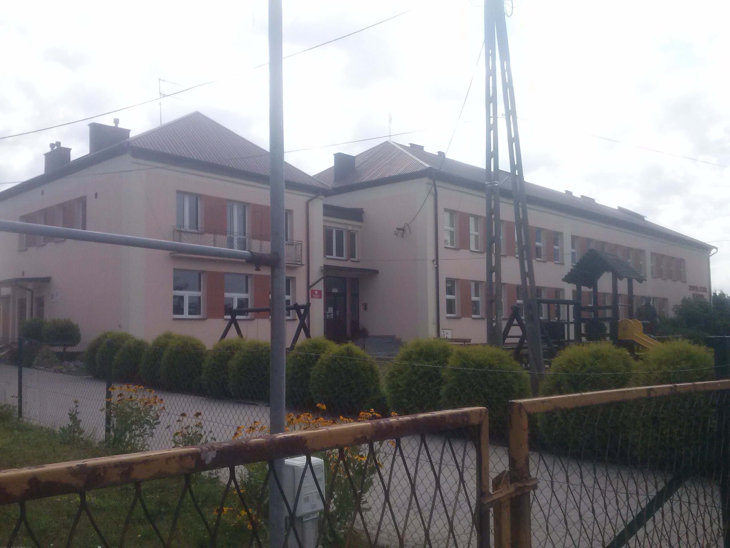 Szkoła podstawowa w Dębnie